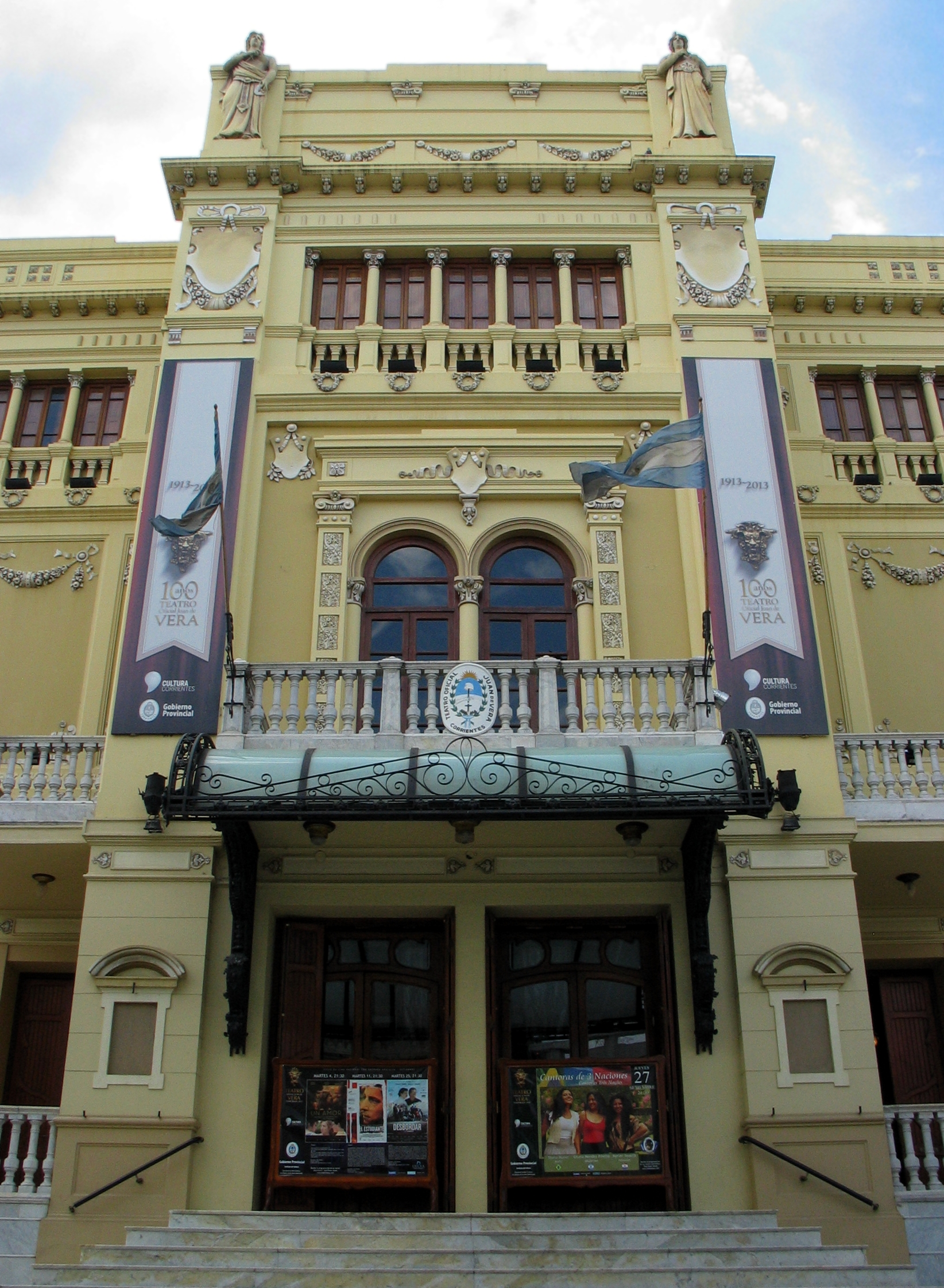 Vista frontal del Teatro Juan de Vera de la ciudad de Corrientes.